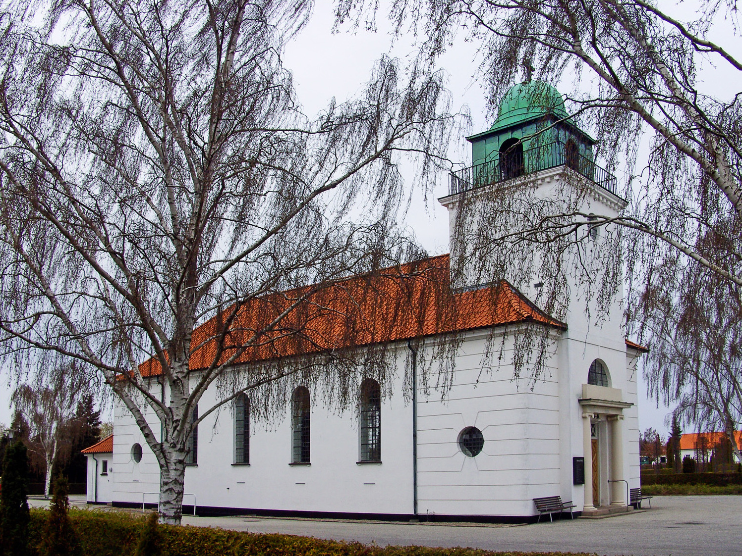 fra nordvest